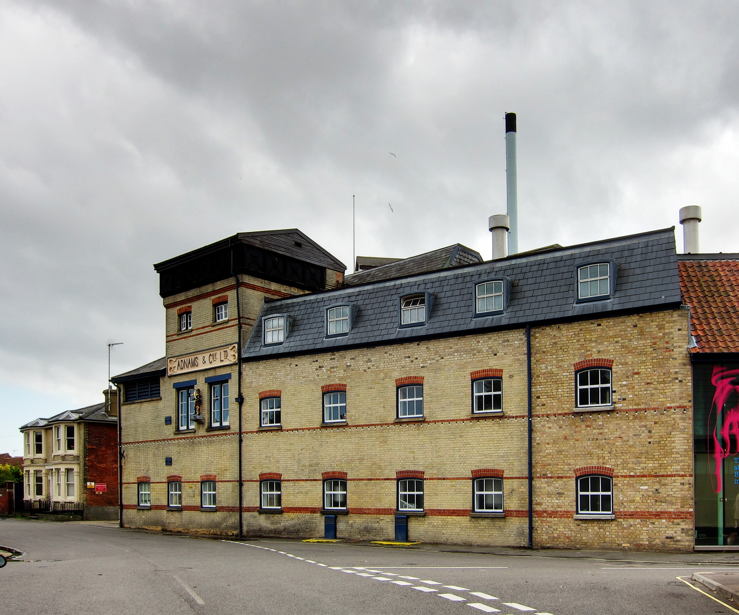 La brasserie Adnams à Southwold.